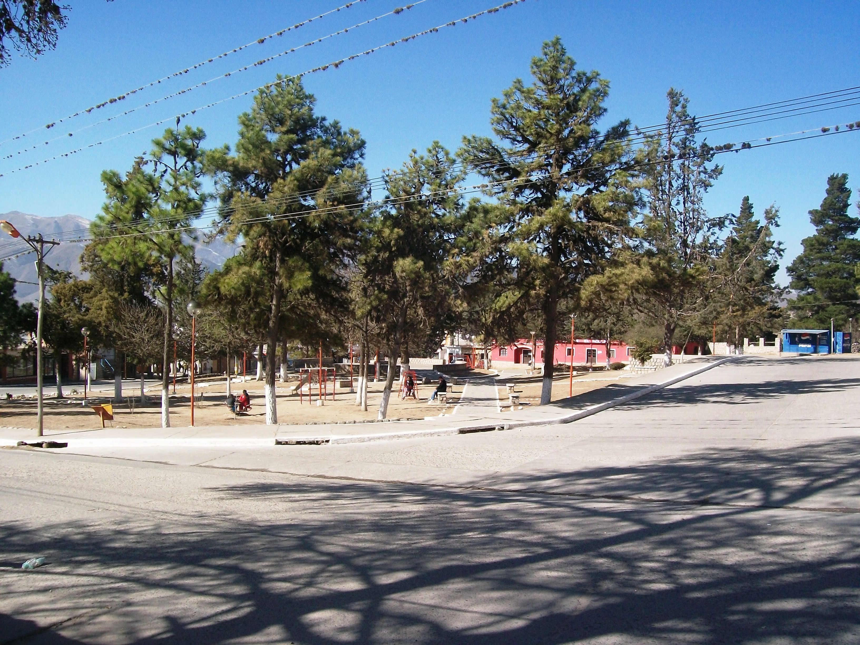 Plaza de la localidad de El Mollar, departamento de Tafí del Valle, Tucumán , Argentina.